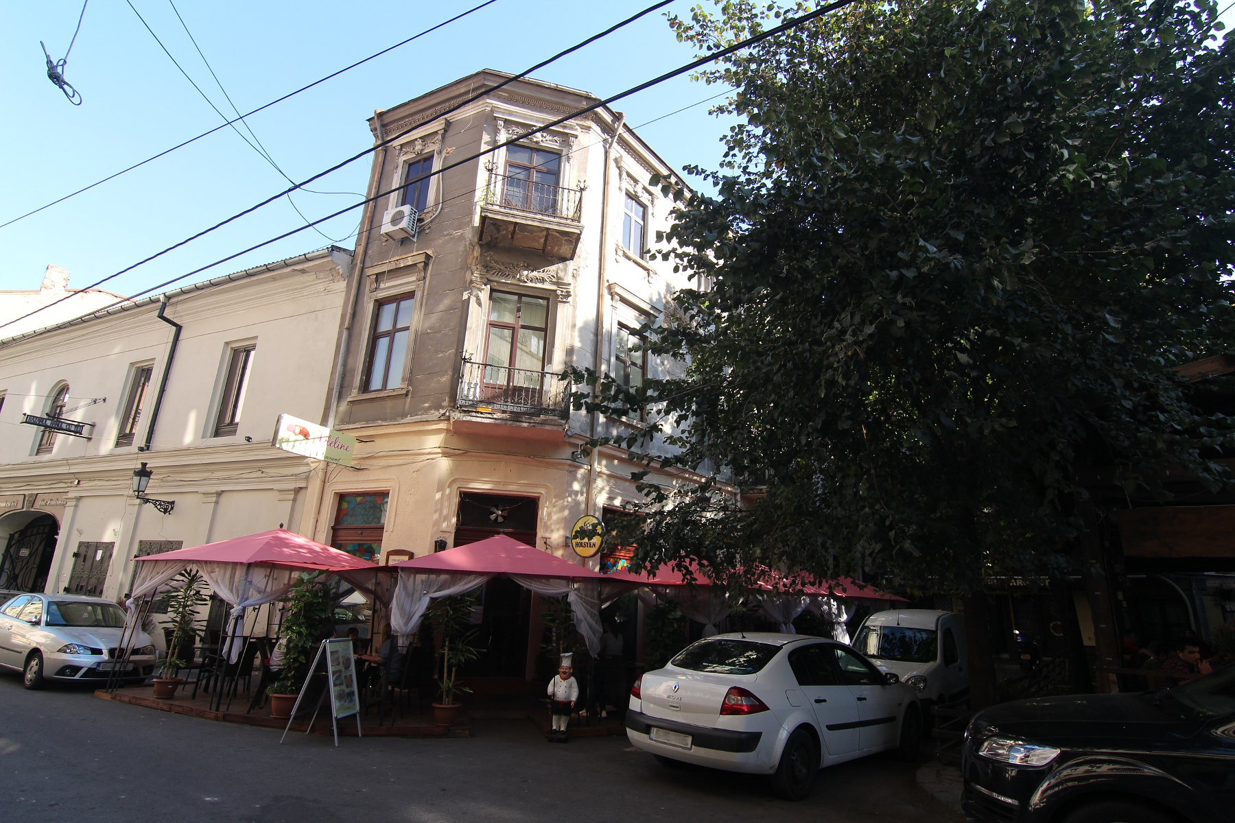 Casă pe Blănari